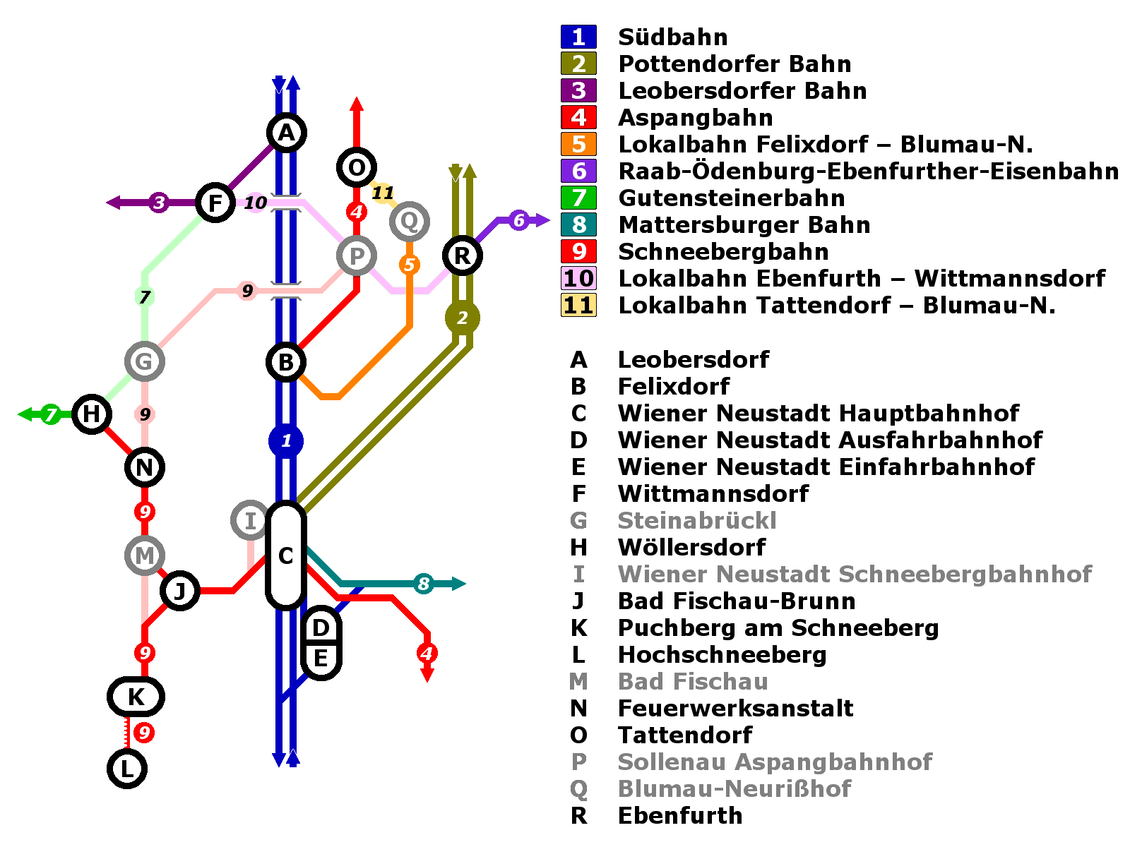 Eisenbahnstrecken im Raum Wiener Neustadt (neue Version)